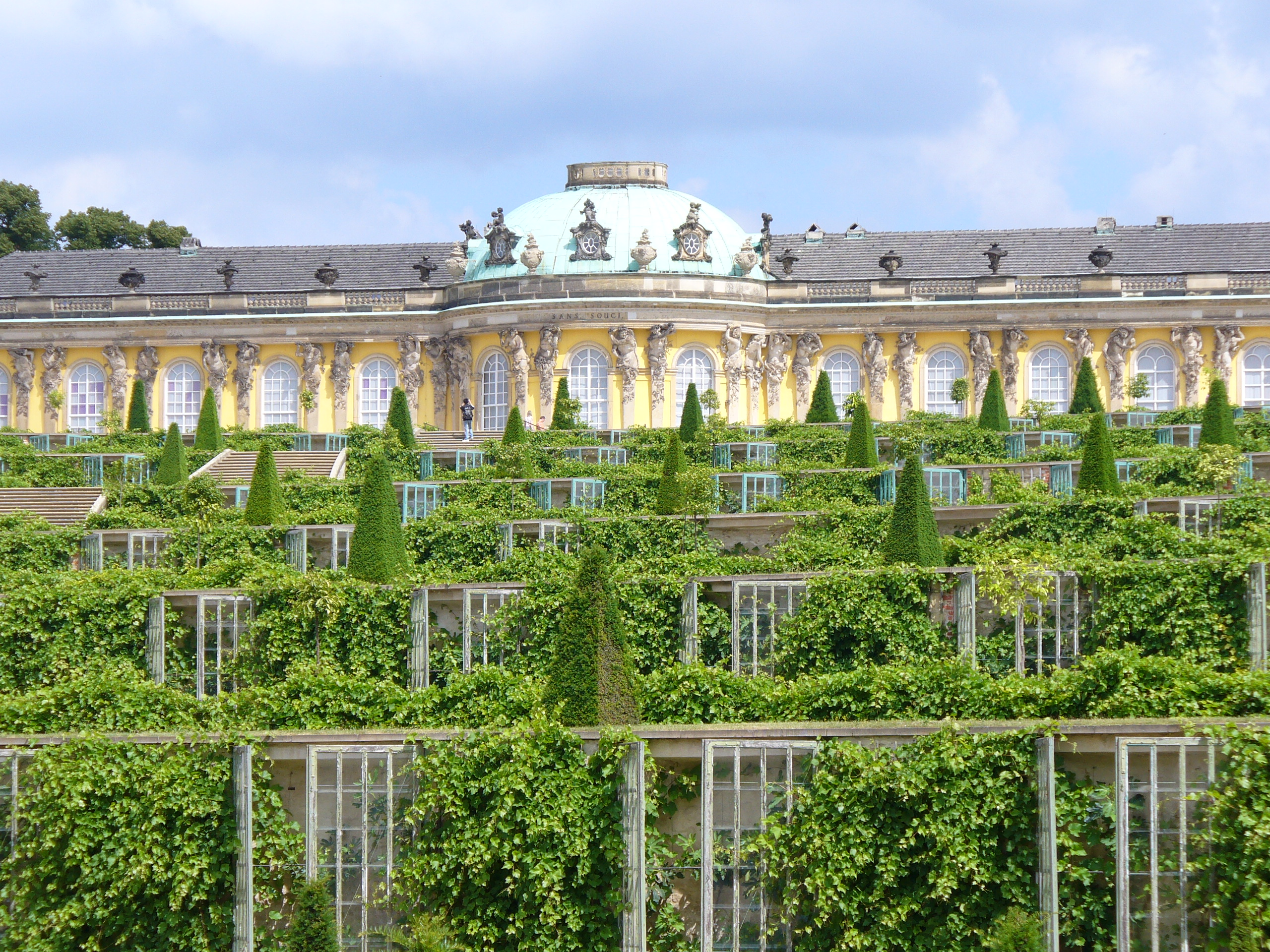 Schloß Sanssouci(frz.sans souci = ohne Sorge) am Hang eines Weinberg 1745-1747 - Architekt Georg Wenzeslaus von Knobelsdorff